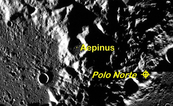 Cráter lunar Aepinus. (Imagen LRO)